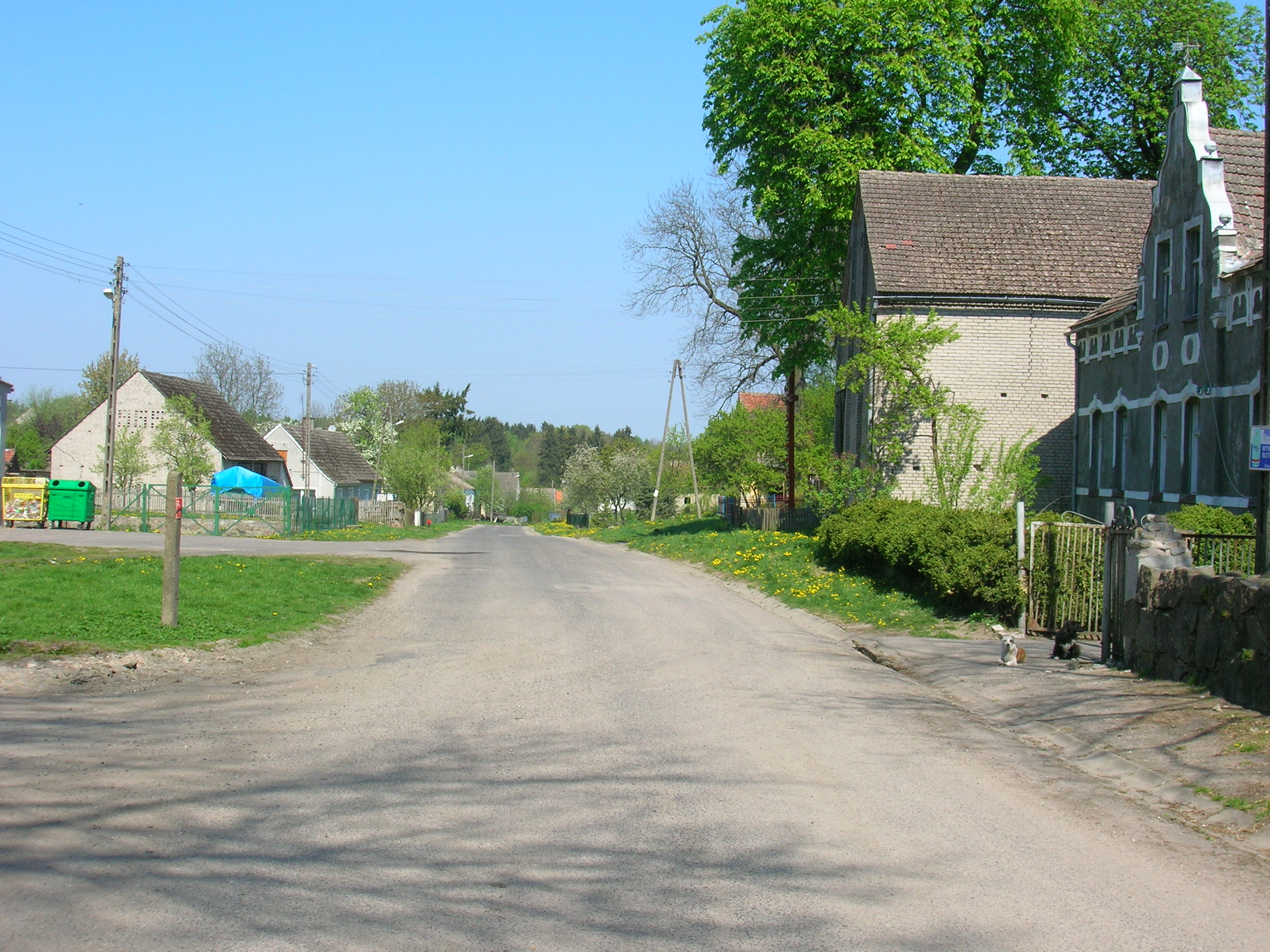 Czechowo - droga